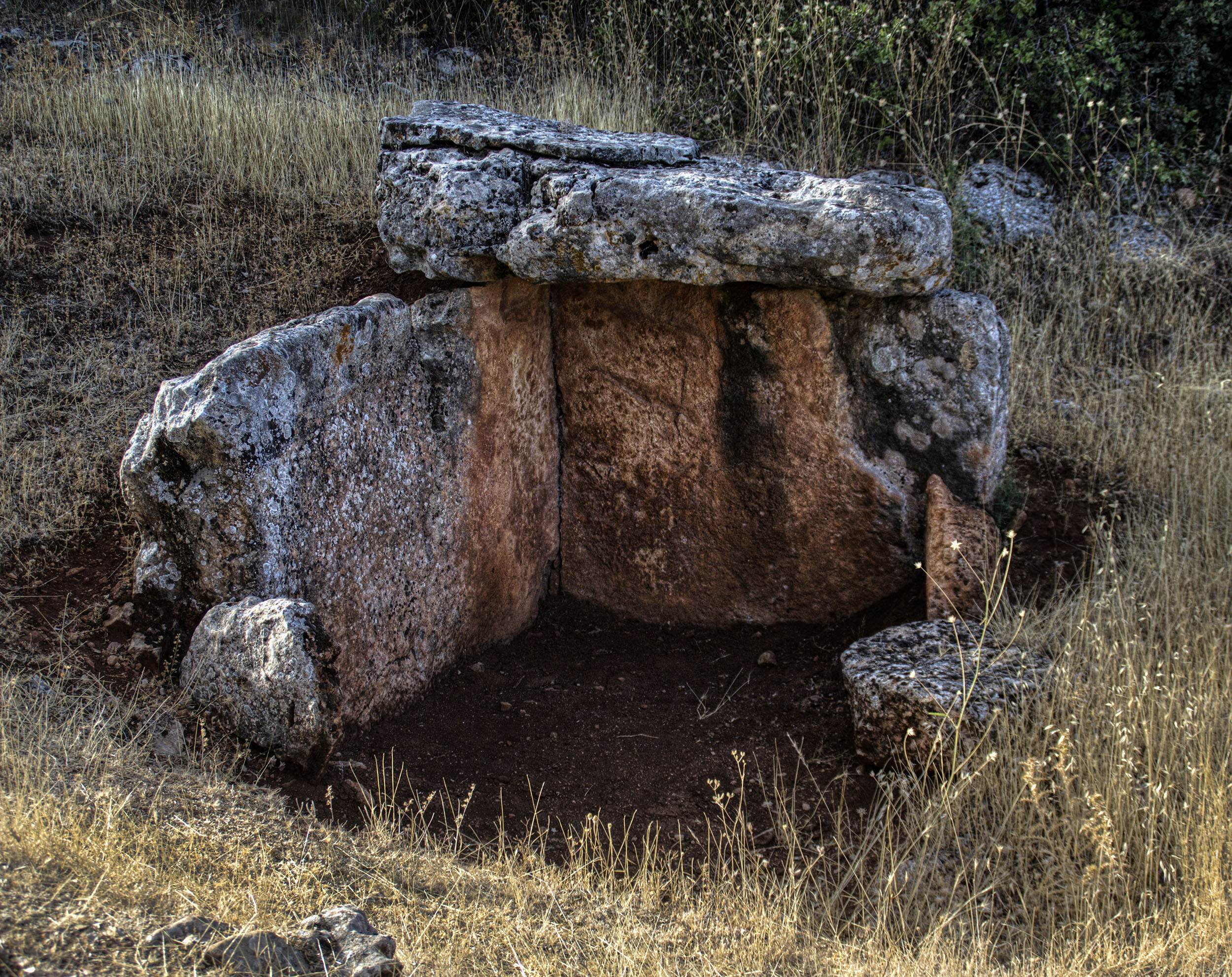 Dolmen in Montefrío